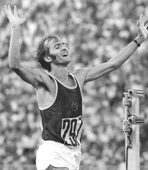 ADN-ZB Mittelstädt 1.8.80 Moskau: Olympia-Überglücklich im Ziel - Waldemar Cierpinski. Der DDR-Athelt ließ die gesamte Spitzenklasse hinter sich und gewann den Marathonlauf in 2:11:03 st. Damit wiederholte er seinen Olympiasieg von Montral.